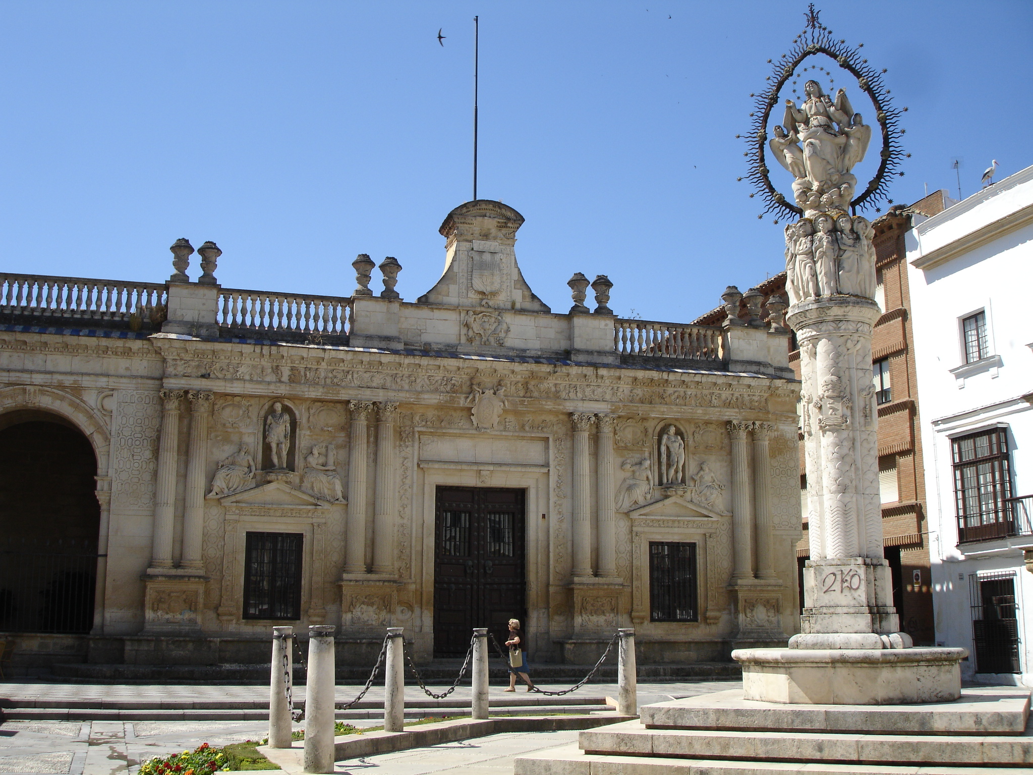 Town Hall (Ayuntamiento). Jerez de la Frontera (Andalusia, Spain)